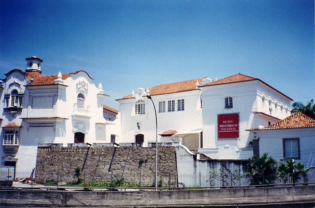 Forte de São Tiago da Misericordia, Rio de Janeiro, Brasil: remanescentes.